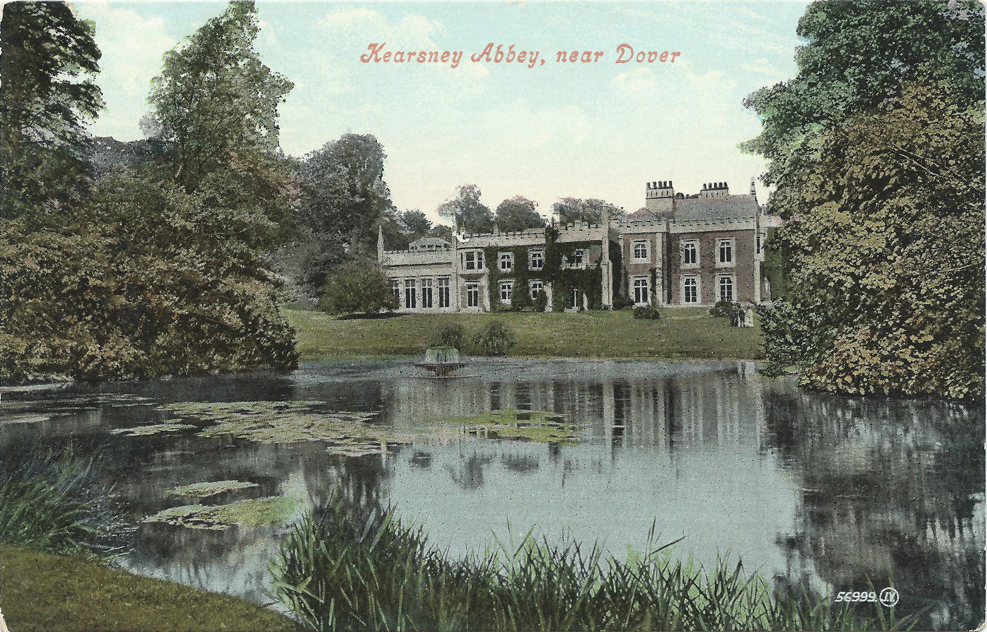 The Kearnsney Abbey house